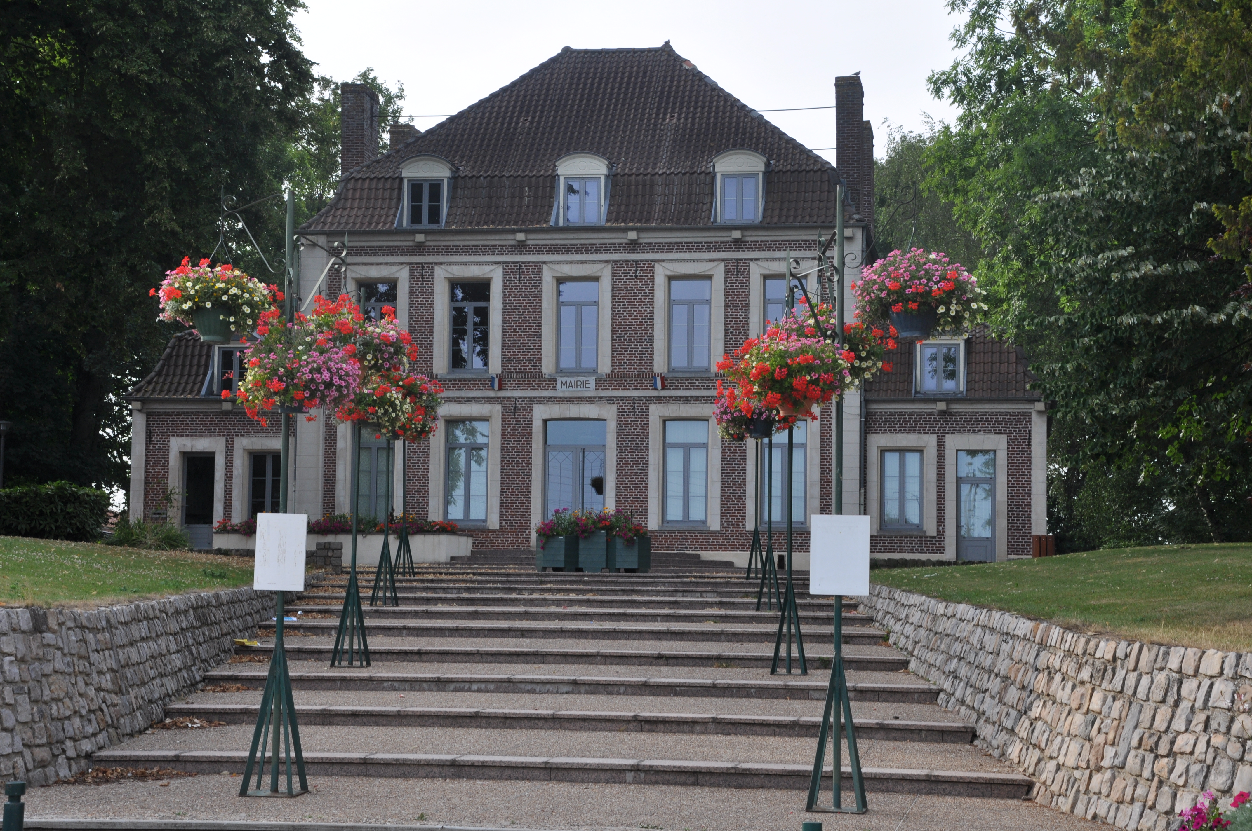 Mairie d'Allouagne, ancien manoir de la famille d'Alincourt